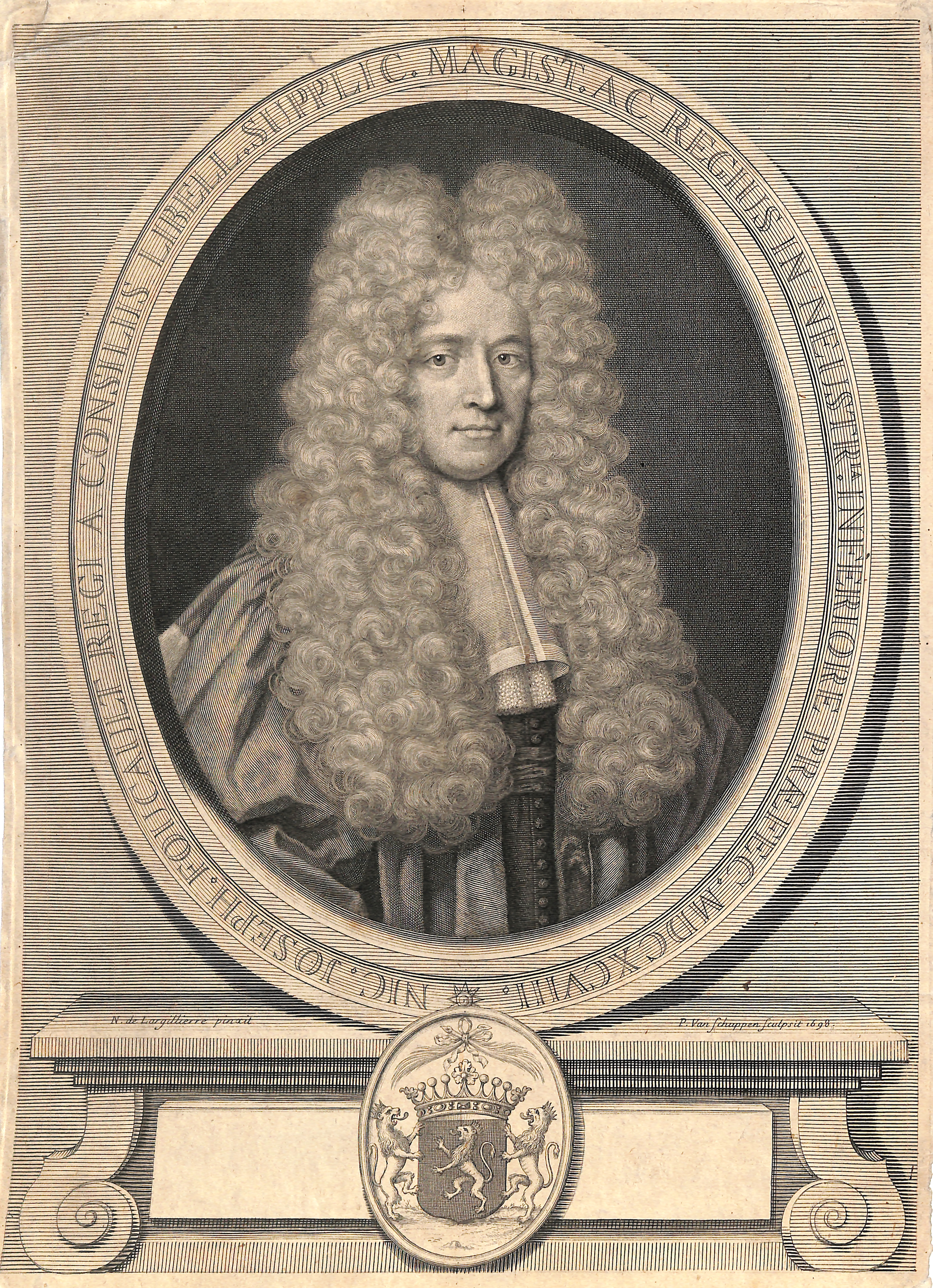 portrait de Nicolas-Joseph Foucault gravé par Van Schupen d'après Largillière